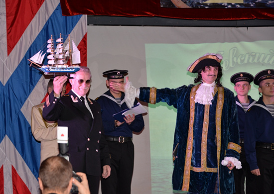 Творческий вечер, посвященный 85-летию со дня рождения народного артиста России капитан-лейтенанта в отставке Ивана Ивановича Краско